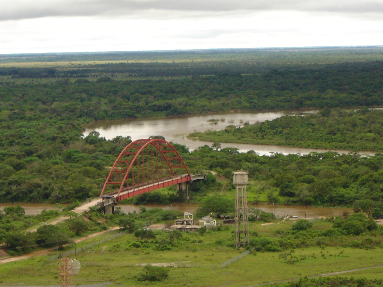 puente Cravo Norte, Colombia.